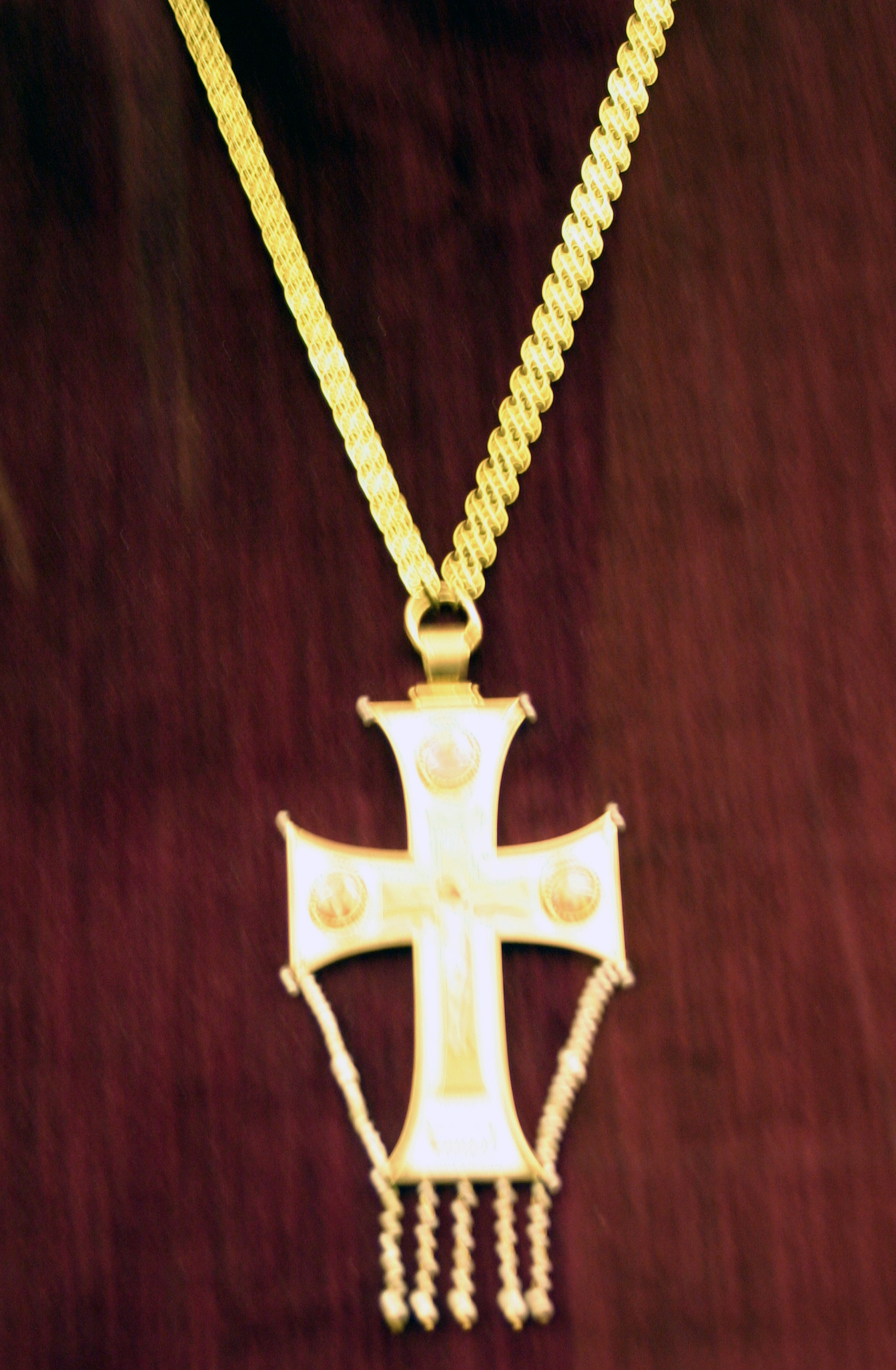 Koruristi Uuden Valamon museossa